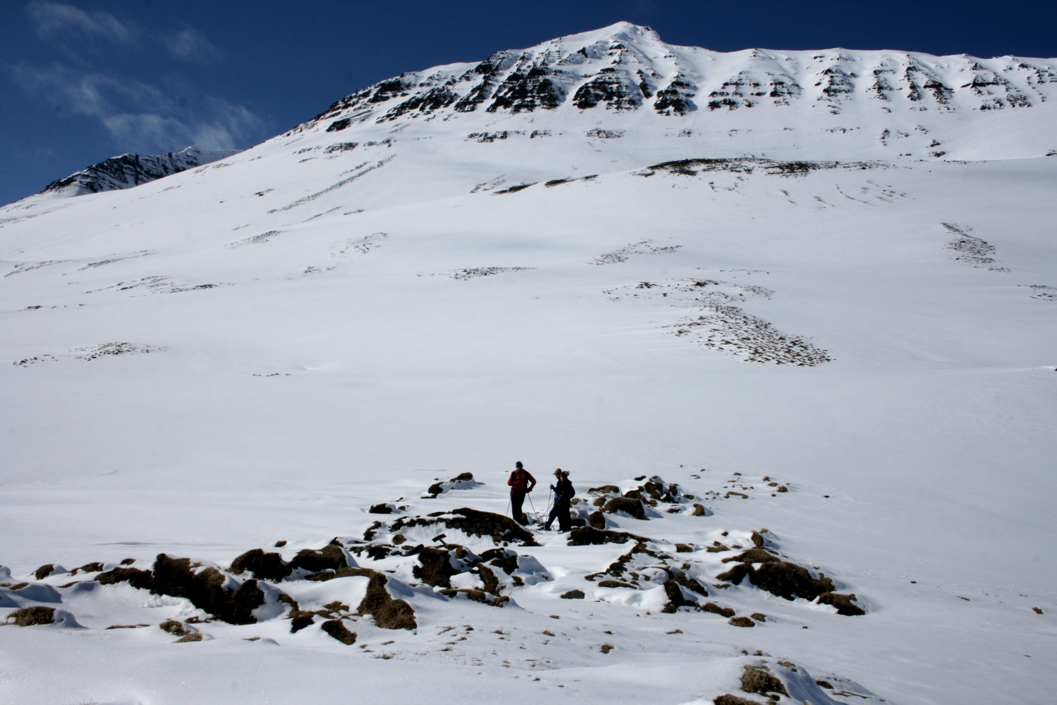 Krosshóll, eyðijörð í Skíðadal, Tröllaskaga, undir hlíðum Kóngsstaðafjalls